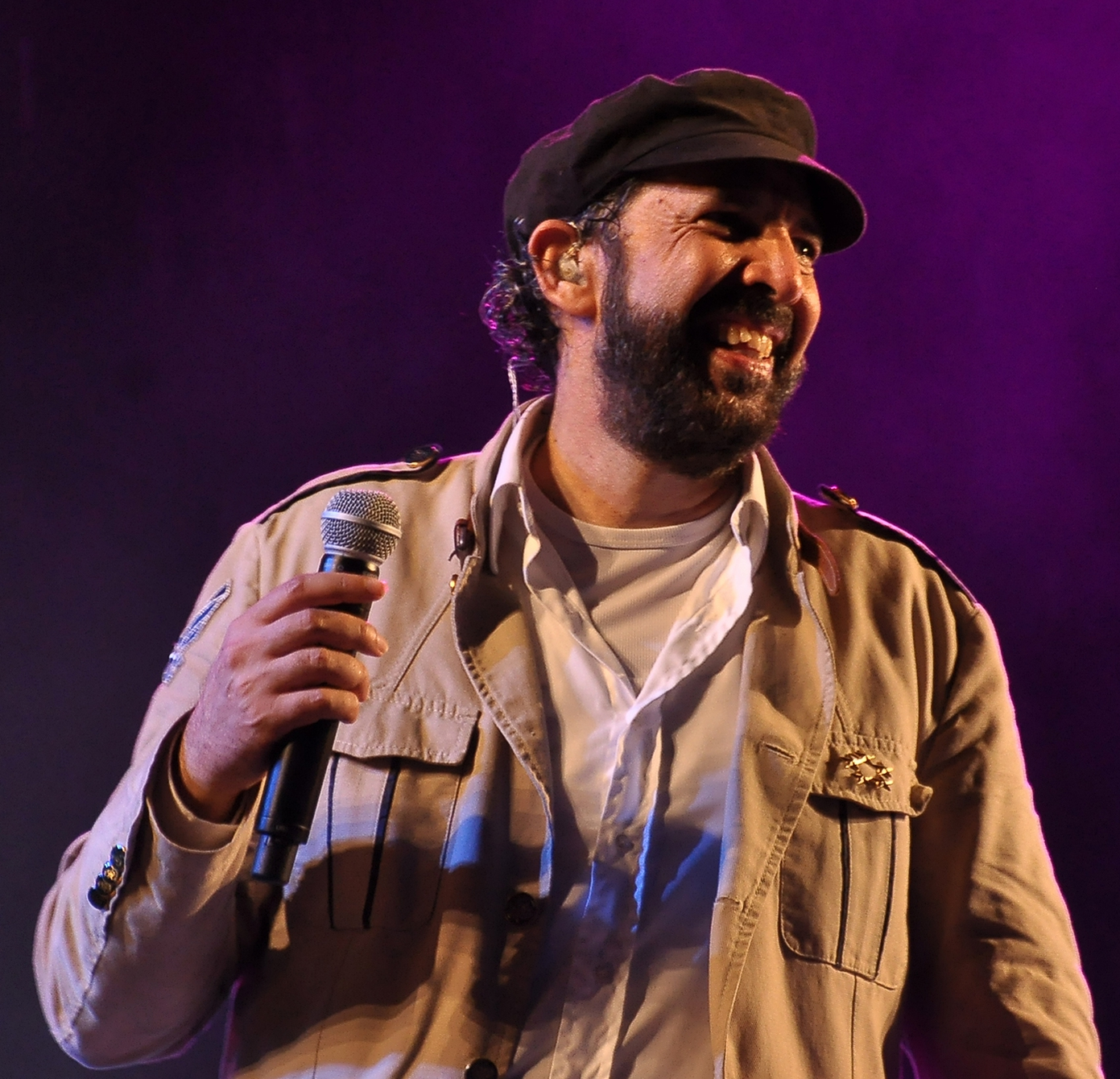 Juan Luis Guerra, Estadio Olimpico, 2012